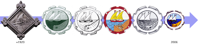 Evolution du logo de Portbou